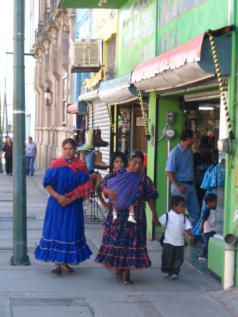 Mujeres Taraumaras en las calles de Chihuahua, México.